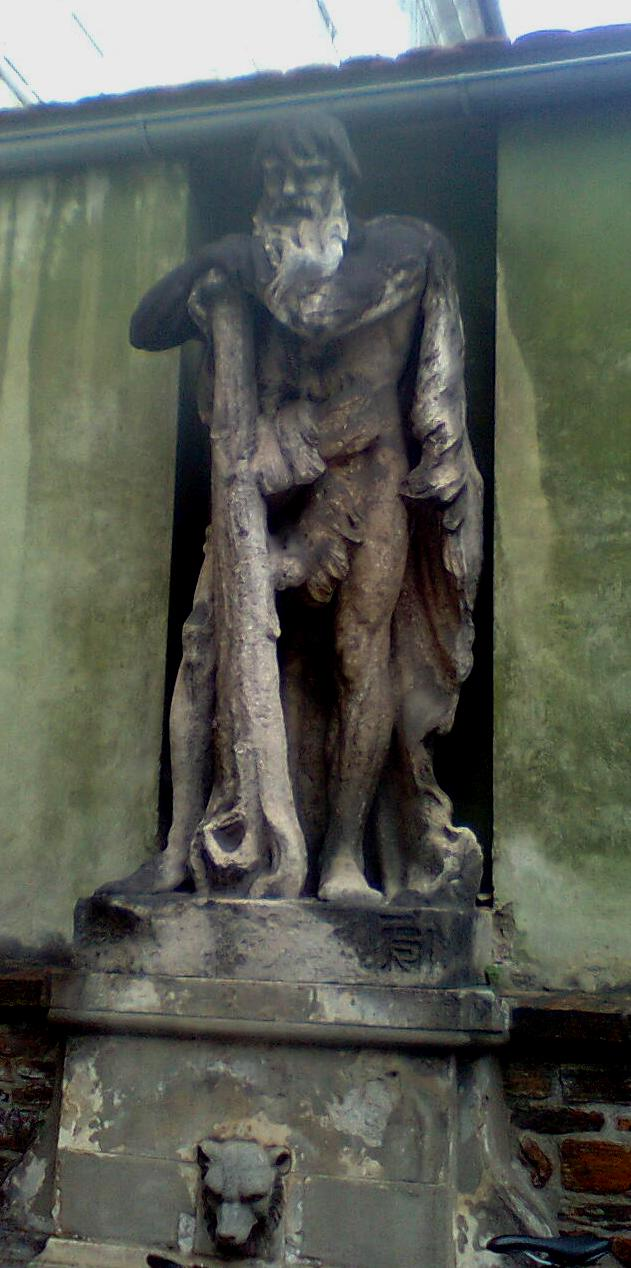 Statue des Wilden Mannes im Innenhof des ehemaligen gleichnamigen Gasthauses in der Grazer Jakoministraße